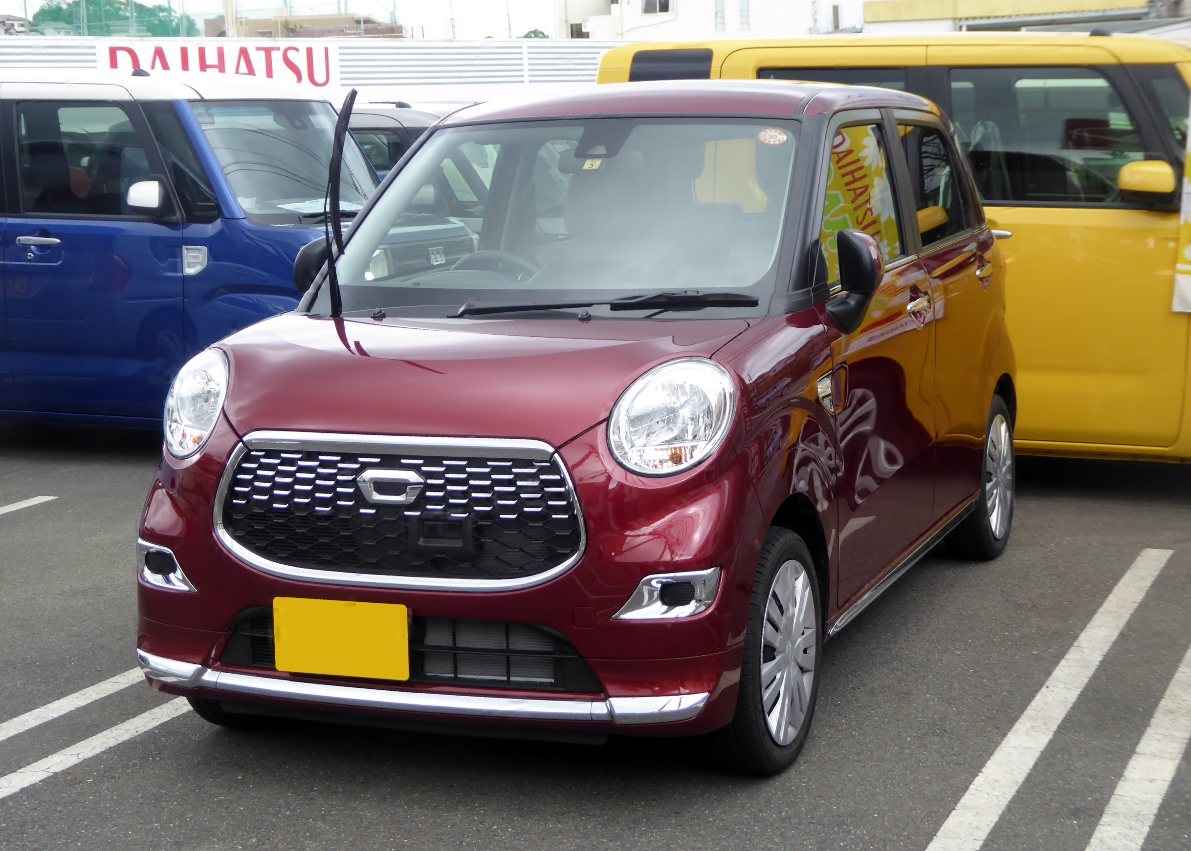 DBA-LA250S型ダイハツ・キャストスタイルX"SA II"をフロントから撮影。